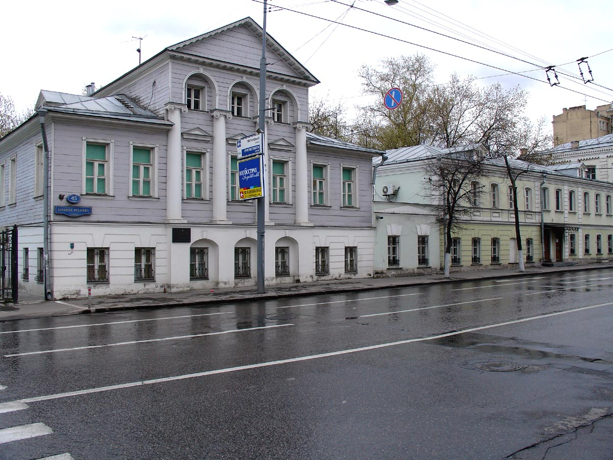 Bolshaya Ordynka Street 45, 47, Moscow